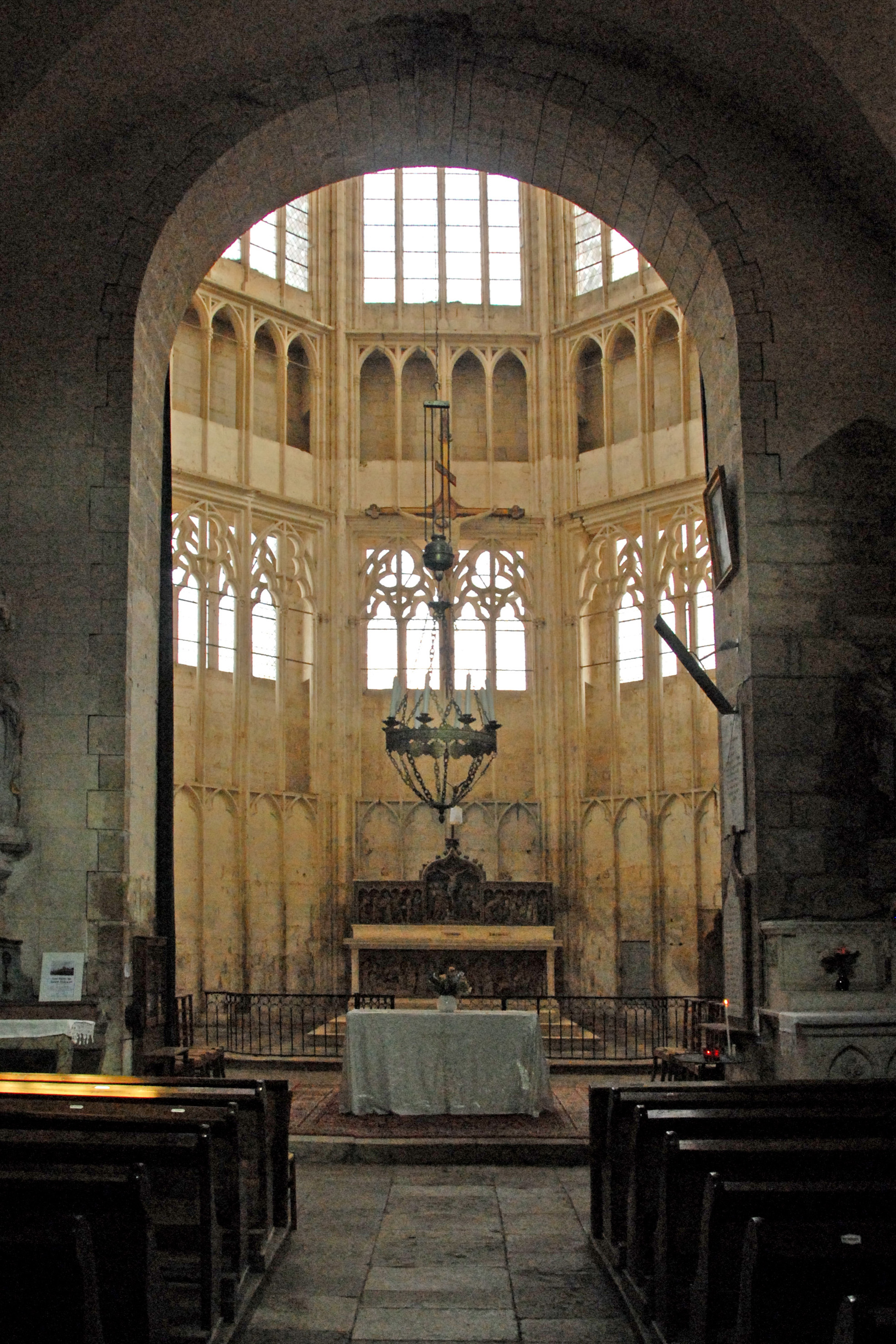 St-Thibault de Saint-Thibault, aus Schiff in den FChor